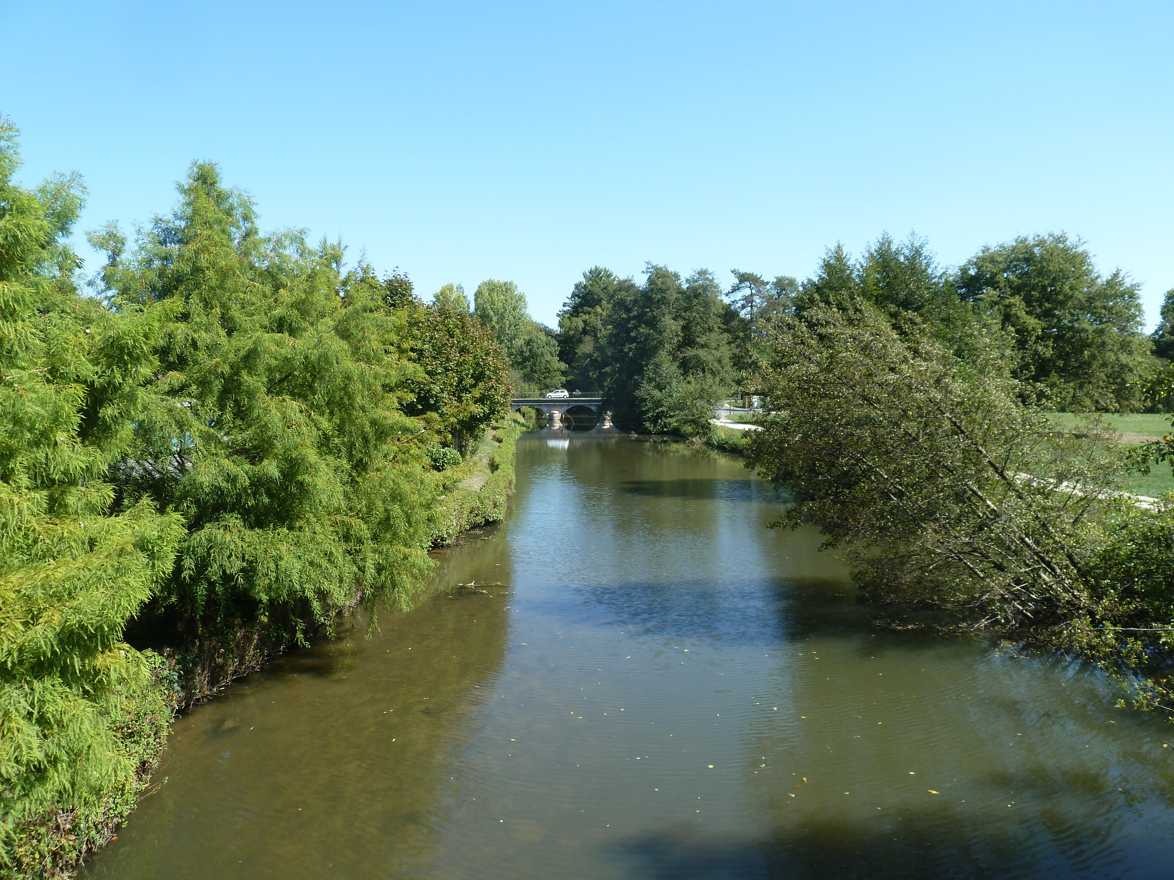 Les berges de la Tharonne à Neung-sur-Beuvron, Loir-et-Cher, France